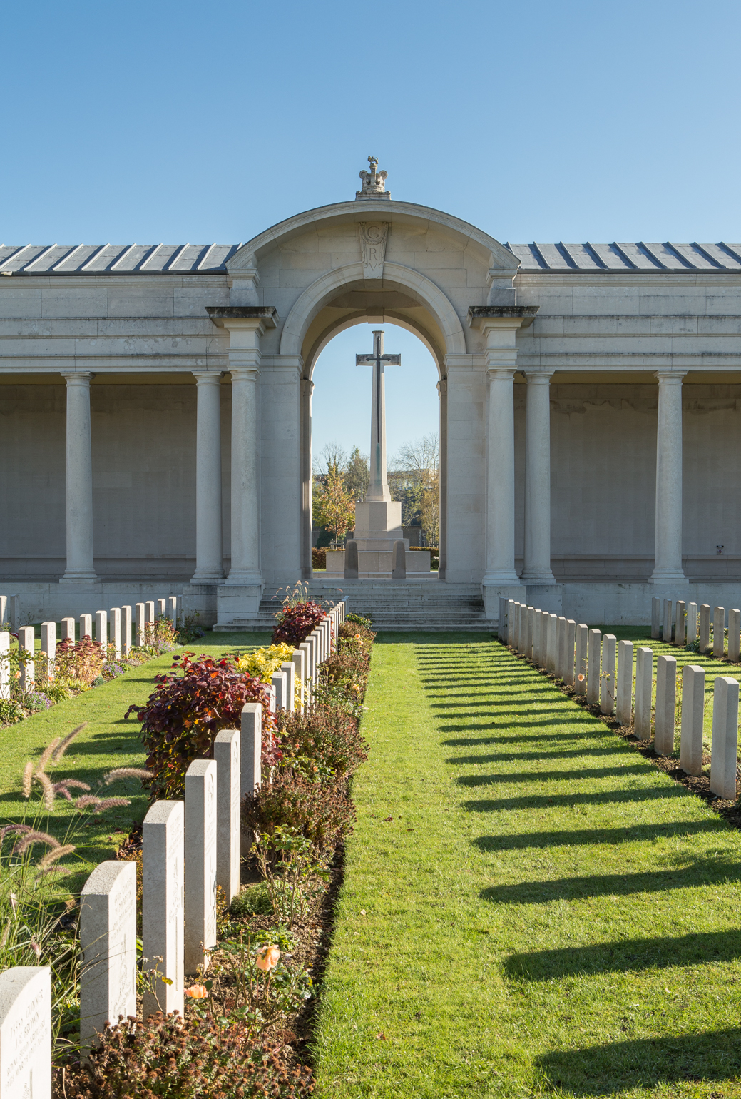 Faubourg d'Amiens Cemetery